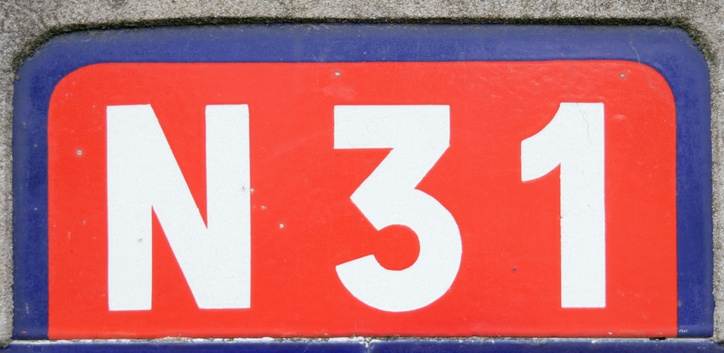 cartouche de panneau de l'ancienne nationale 31